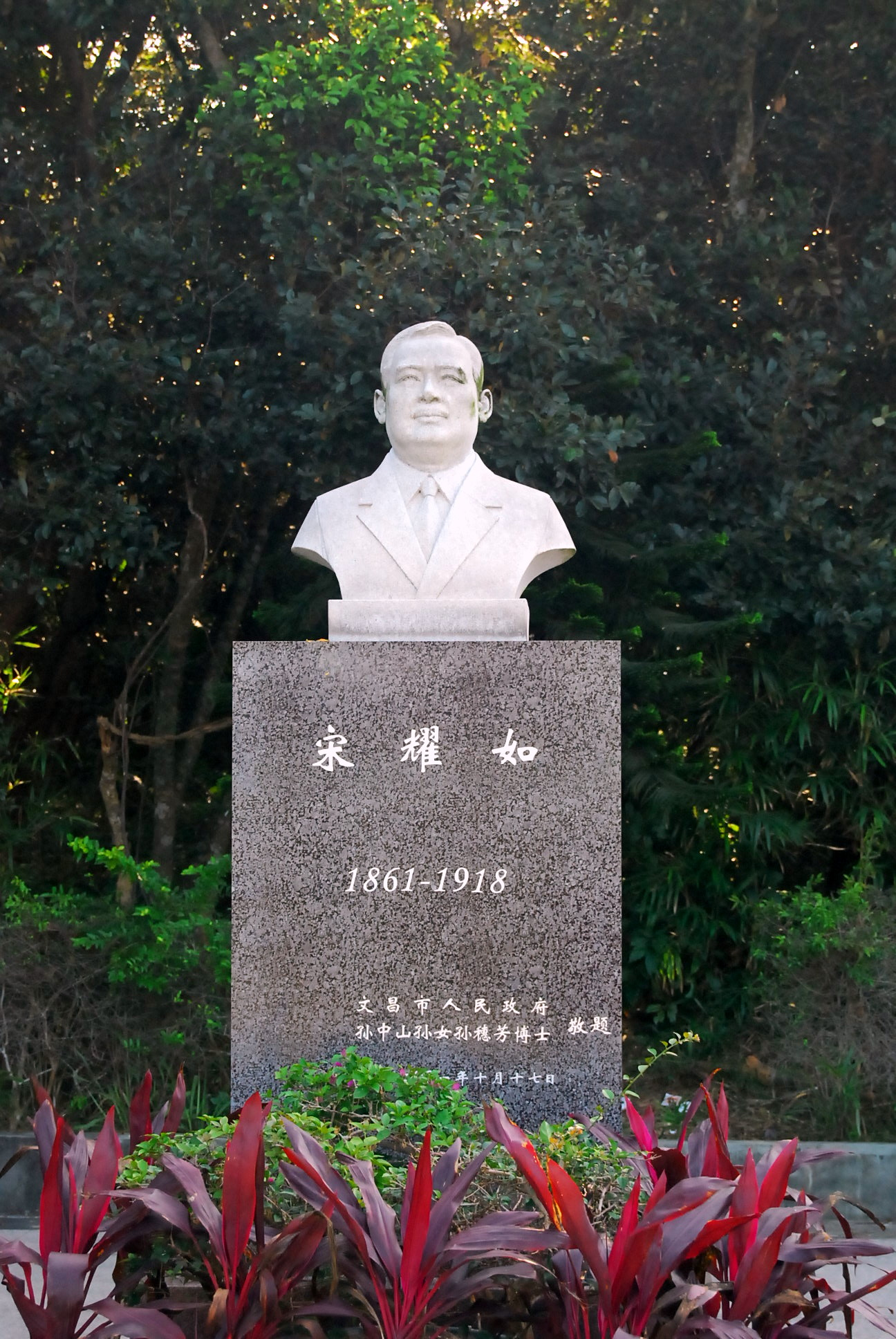 宋耀如，于海南文昌